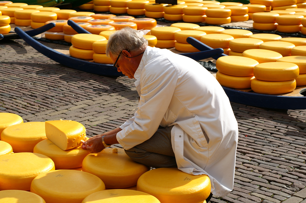 Alkmaar